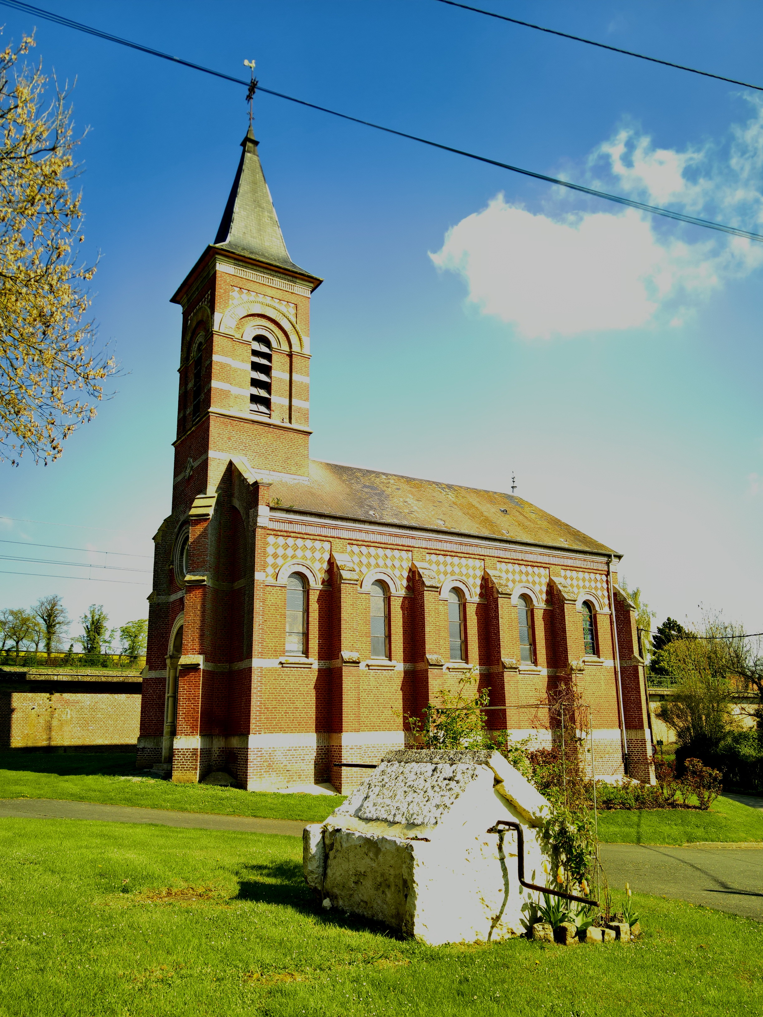 Namps-Maisnil (Rumaisnil) : L'église Notre-Dame et un puits. Au fond, la ligne de chemin de fer de Saint-Roch à Darnétal-Bifurcation